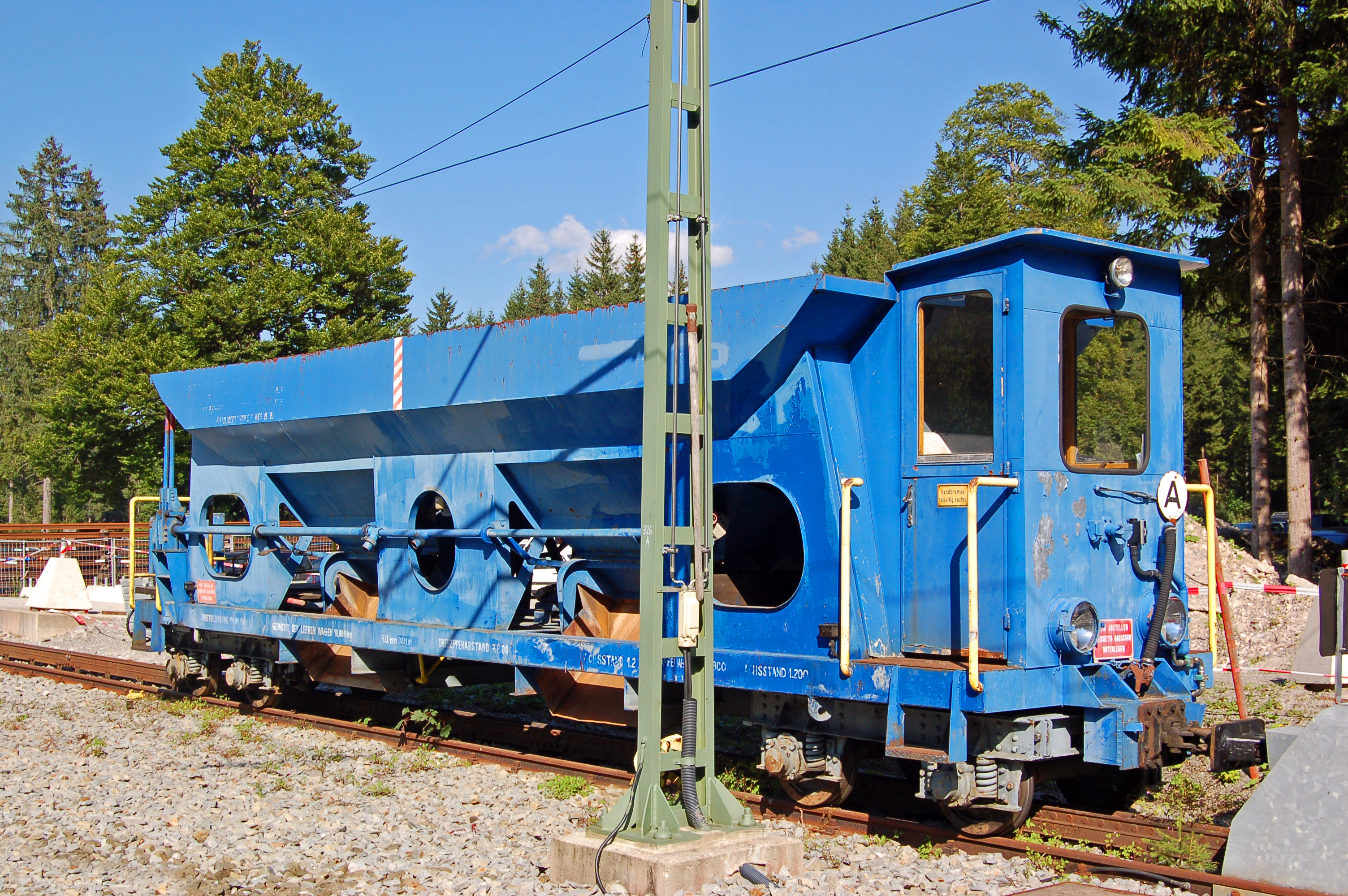 Schotterwagen. Die Bayerische Zugspitzbahn gehört neben der Wendelsteinbahn, der Drachenfelsbahn und der Stuttgarter Zahnradbahn zu den vier noch betriebenen Zahnradbahnen Deutschlands. Die in Meterspur gebaute Strecke führt von Garmisch aus auf die Zugspitze, Deutschlands höchstem Berg. Die Bahn wurde in den Jahren 1928 bis 1930 erbaut. Von Garmisch aus führt die Strecke auf 7,5 km Länge mit Adhäsionsantrieb (ohne Zahnrad) nach Grainau. Im Bf. Grainau beginnt die steile Bergstrecke mit Zahnradantrieb. Früher wurden in Grainau die Tal-Loks (ohne Zahnradantrieb) und Berg-Loks (mit Zahnradantrieb) gewechselt. Die heutigen Triebwagen fahren durchgehend. Nach dem Haltepunkt Eibsee erreicht die Bahn die Station Riffelriss. Kurz danach beginnt der 4466 m lange Zugspitz-Tunnel zum Schneefernerhaus. Dort endete die Bahn in einem unterirdischen Endbahnhof. 1987 wurde die Strecke im Gipfelbereich ausgebaut und führt nun durch den »Rosi-Tunnel« (benannt nach der Skisportlerin Rosi Mittermaier – sie war Patin des Tunnels) zum tiefergelegenen Zugspitzplatt auf 2588 m Höhe. Die alte Strecke zum Schneefernerhaus wird fahrplanmäßig nicht mehr angefahren. Die Gesamtlänge der Strecke beträgt genau 19 km, davon 11,5 km als Zahnradbahn.